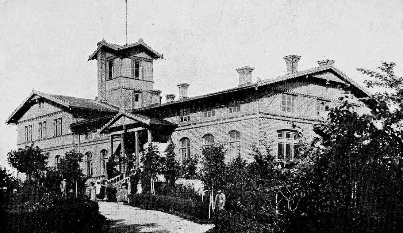 Devēne mõisa peahoone enne põlengut.